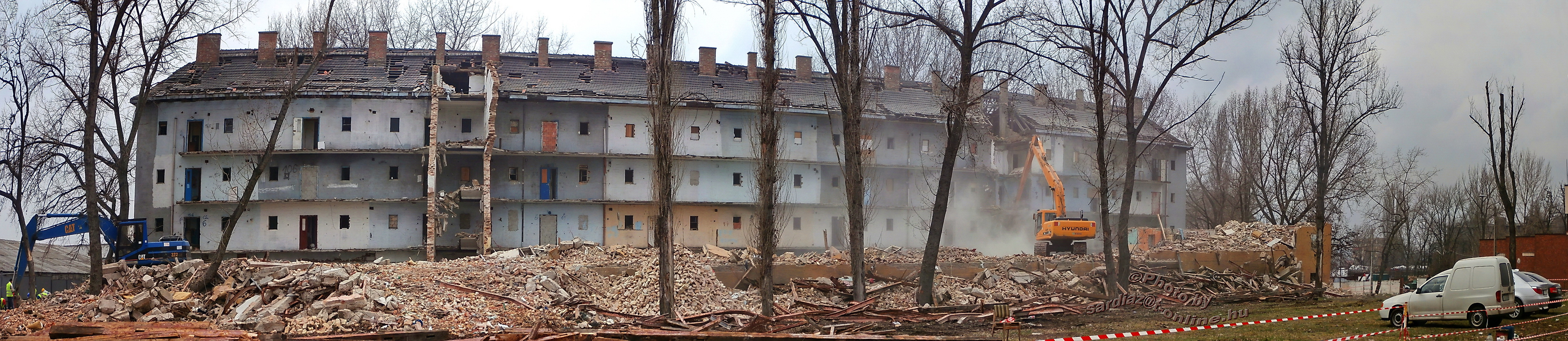 Dzsumbuj, egykori szükséglakás-telep Budapest IX. kerületében, az Illatos út és a Gubacsi út sarkánál, a harmadik ház bontása